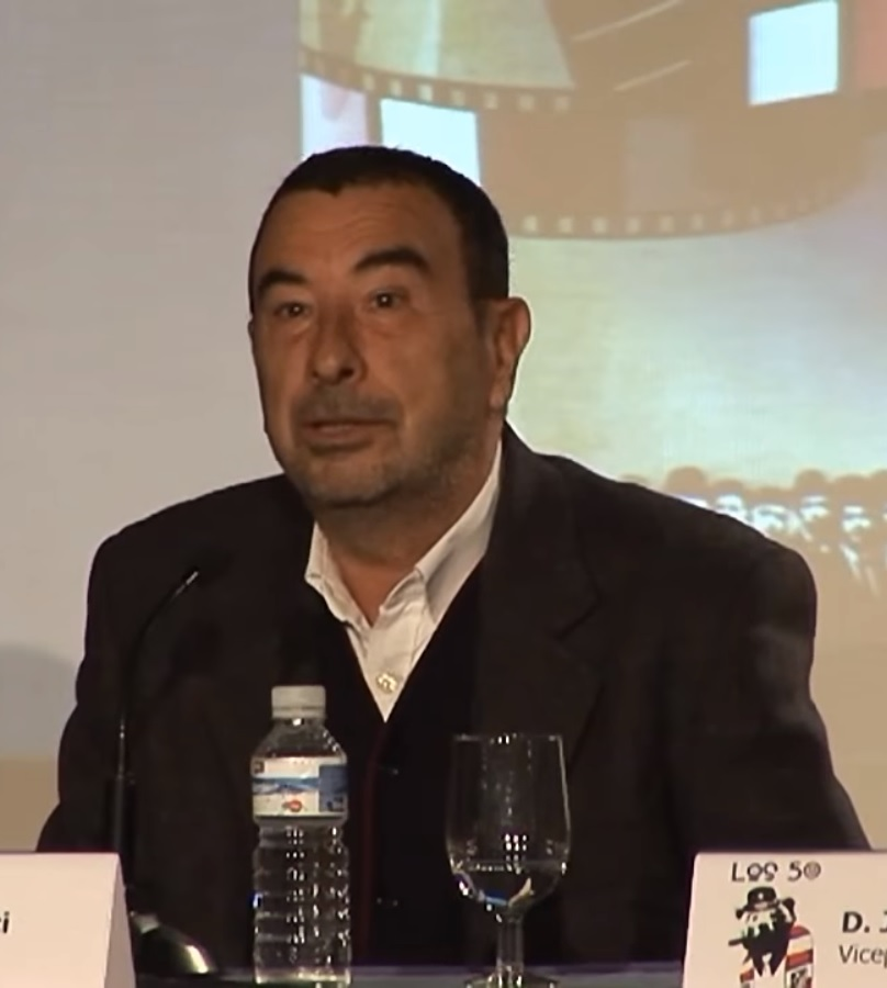 Conferencia del director de cine José Luis Garci, celebrada el 28 de noviembre de 2013 en el centro cultural Galileo de Madrid. Bernardo Salazar y José Antonio Martín "Petón" acompañaron al director en su exposición.